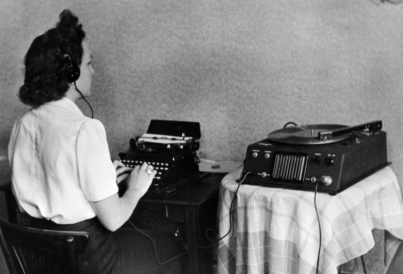 Westzonen, Diktiergerät "Dimafon" Diktat aus dem Kopfhörer Das "Dimafon", ein Meisterstück neuzeitlicher Magnet-Tontechnik, erregte schon auf der Frankfurter Messe die Aufmerksamkeit interessierter Kreise. Es wird jetzt von einer Homburger Firma in Serienfabrikation hergestellt, ist kaum grösser, schwerer und teurer als eine Reiseschreibmaschine und nimmt Diktate, Ferngespräche und Rundfunksendungen auf Schallplatte auf. Durch Lautsprecher - oder wenn andere Mitarbeiter gestört würden, auch durch Kopfhörer - kann die Aufnahme abgehört werden. Ein Fusshebel gestattet Unterbrechung oder Wiederholung unklarer Stellen. 26-4-49 Illus-dpd 3155-49 [Westzonen.- Sekretärin mit Schreibmaschine und Diktiergerät "Dimafon".]